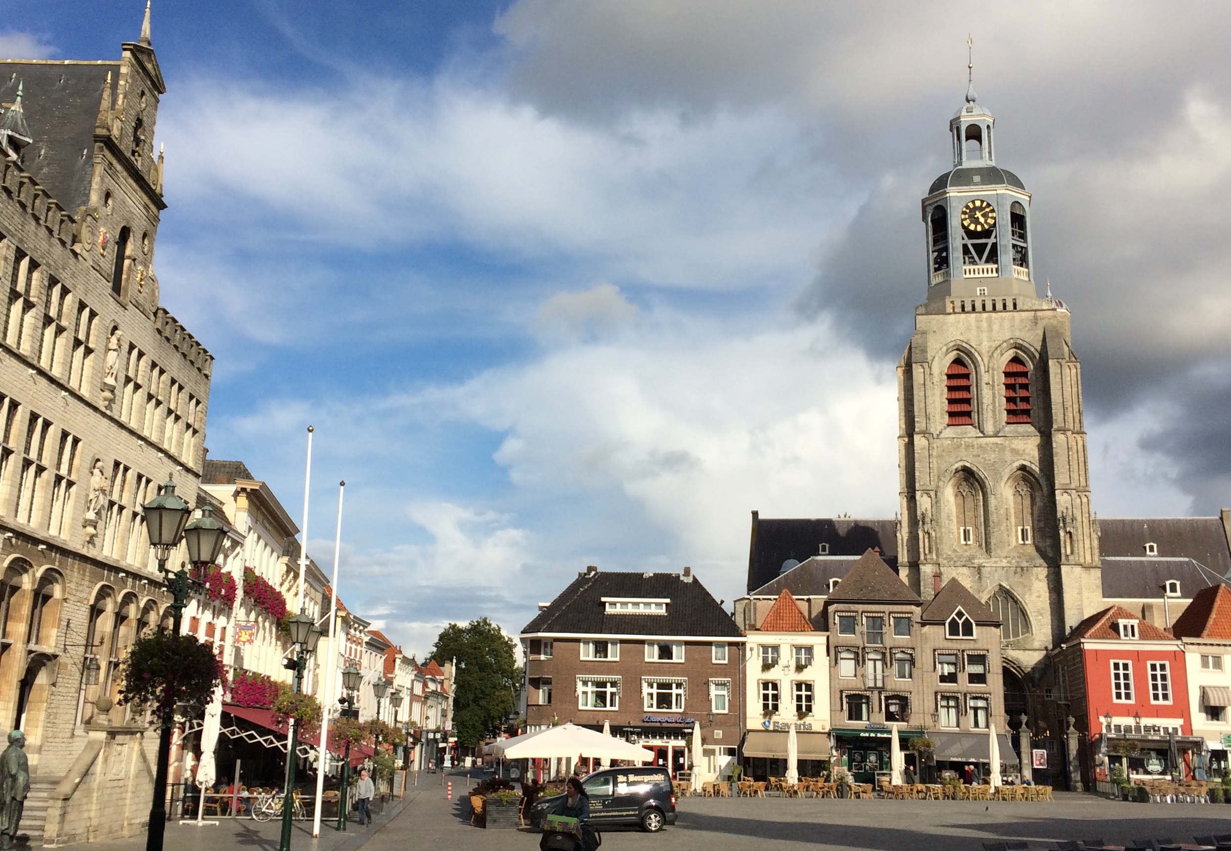 Grote Markt met oud stadhuis links en uitzicht op de Peperbus, Bergen op Zoom.